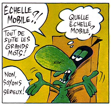 Image 5, page 10 de l'histoire : " Cultur Day ! " tirée de "La Vie Quotidienne du Concombre Masqué "